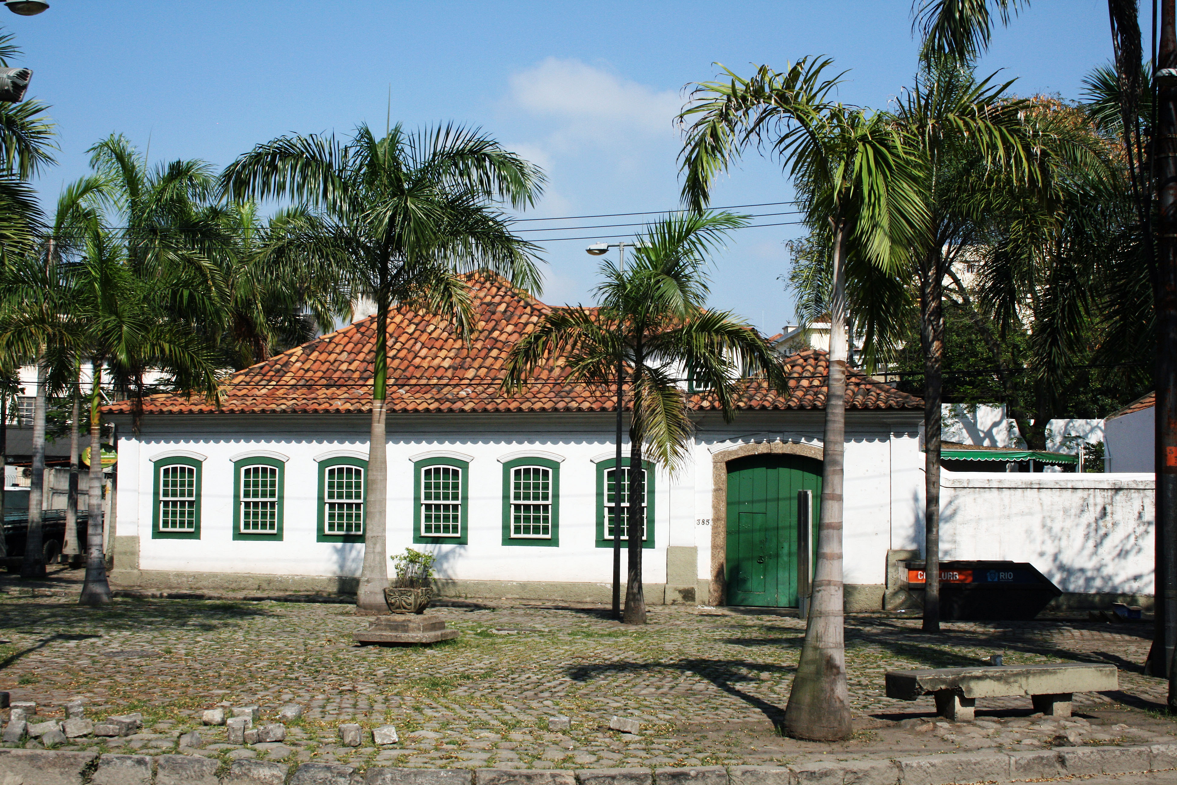 Casa da família Tavares Guerra, próxima à Quinta do Caju, conhecida como Casa de Banho D. João VI, foi frequentada pelo monarca por volta de 1817, por indicação médica. O prédio é um raro exemplar da arquitetura do Século XIX, tombada pelo IPHAN em 1938 e restaurada pela Comlurb em 1996, para abrigar o Museu da Limpeza Urbana.